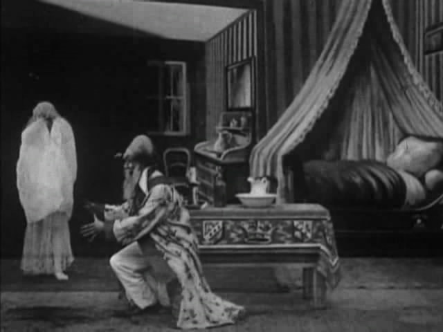 photo du film "Le Revenant" (Méliès, 1903)